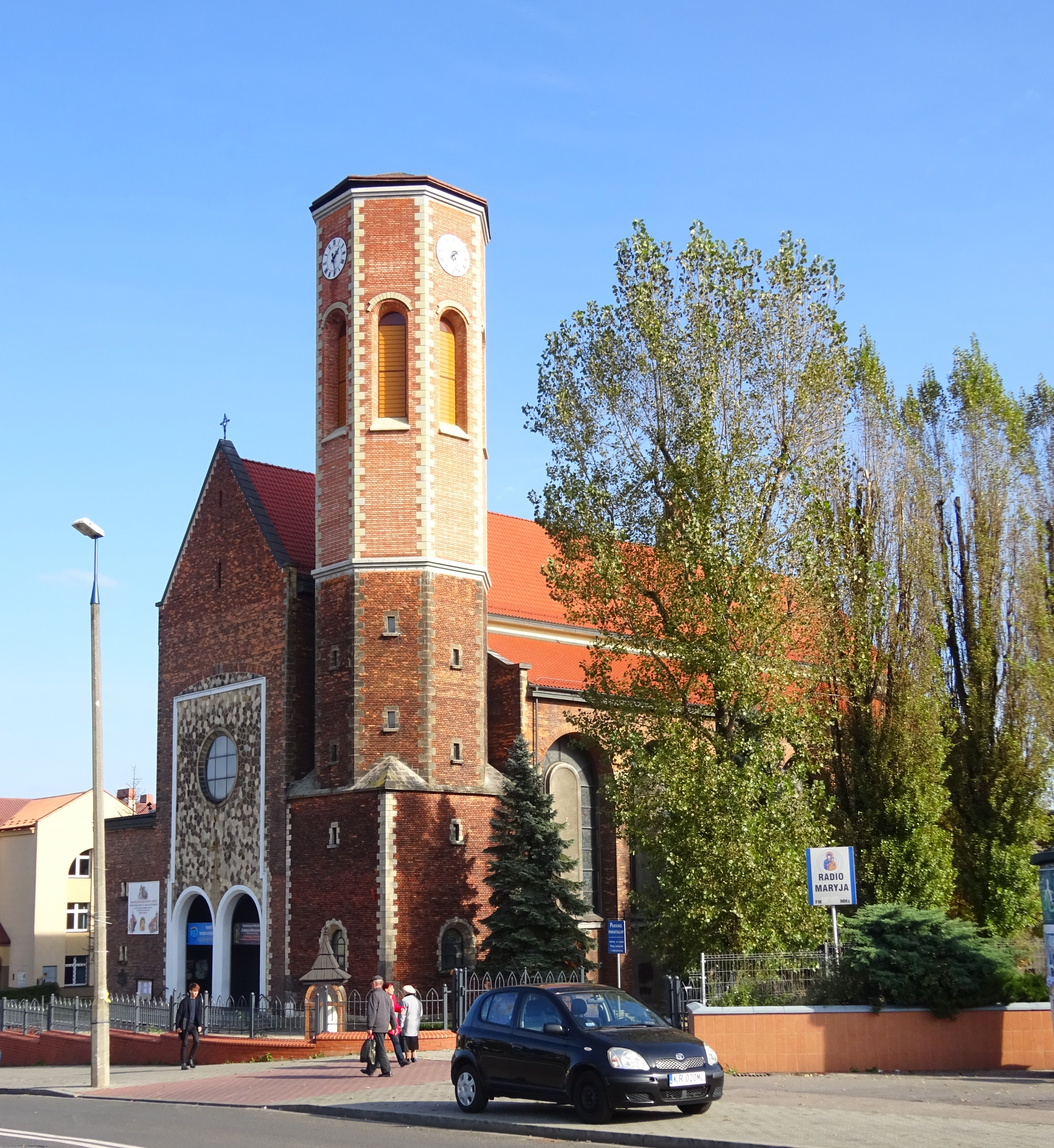 Kościół Matki Bożej Dobrej Rady w Krakowie-Prokocimiu, przy ul. Wlotowej. Stan po wybudowaniu wieży, 2016.